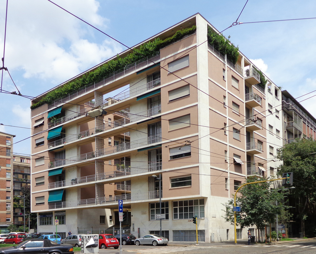 Milano, la casa Rustici in corso Sempione 36, angolo via Mussi e via Procaccini. Fu costruita dal 1933 al 1935 su progetto di Pietro Lingeri e Giuseppe Terragni.